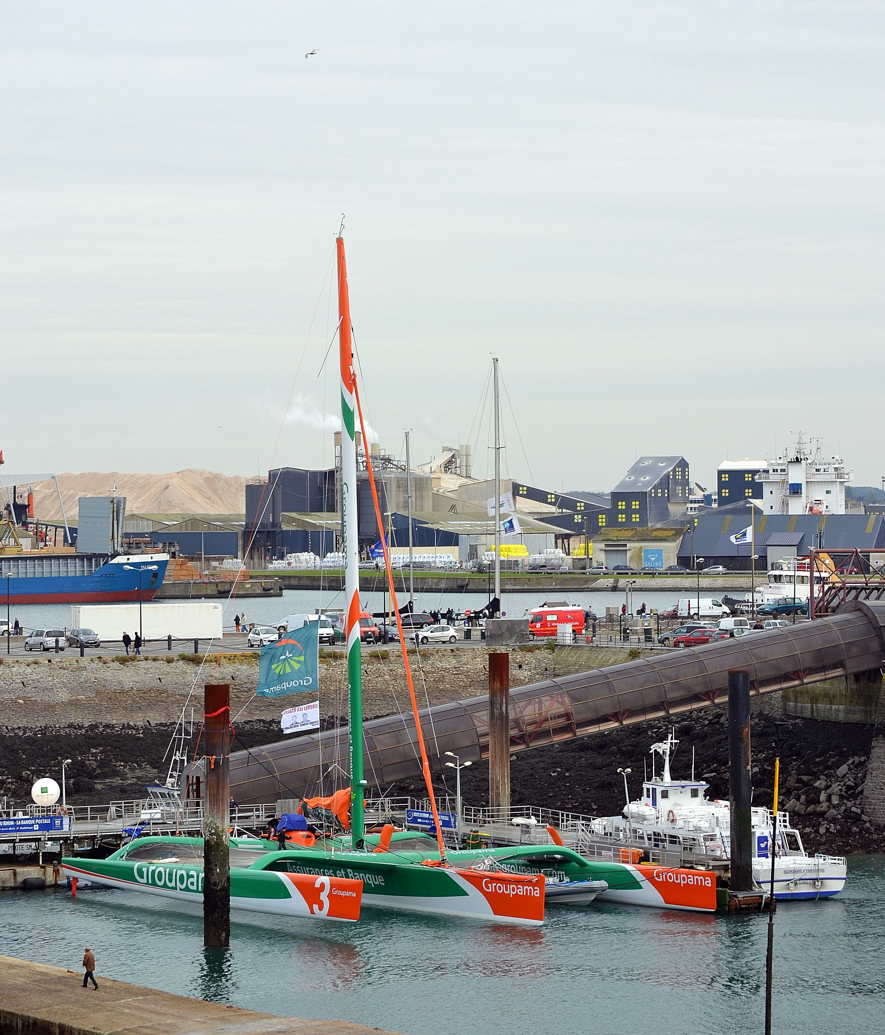 Groupama III im Hafen von Saint-Malo vor der Route du Rhum 2010, die es gewann. das Boot war verkürzt und generell modifiziert worden, um von Franck Cammas während der Regatta einhand gesegelt werden zu können.